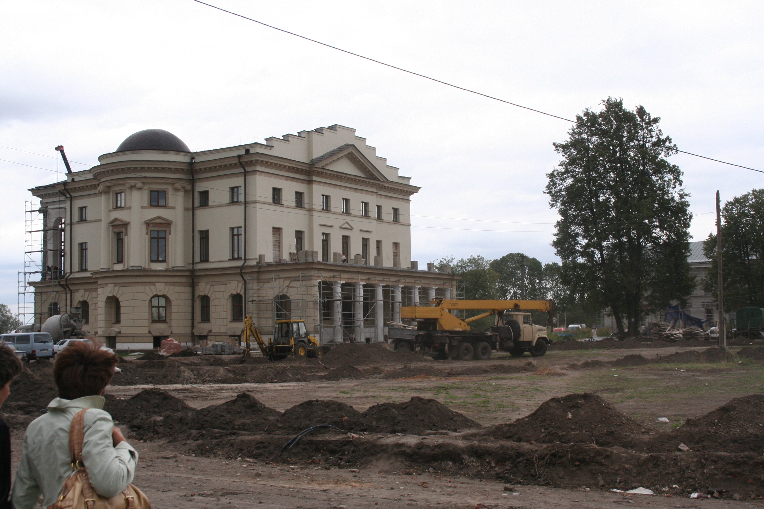 Палац Розумовського у Батурині під час реконструкції